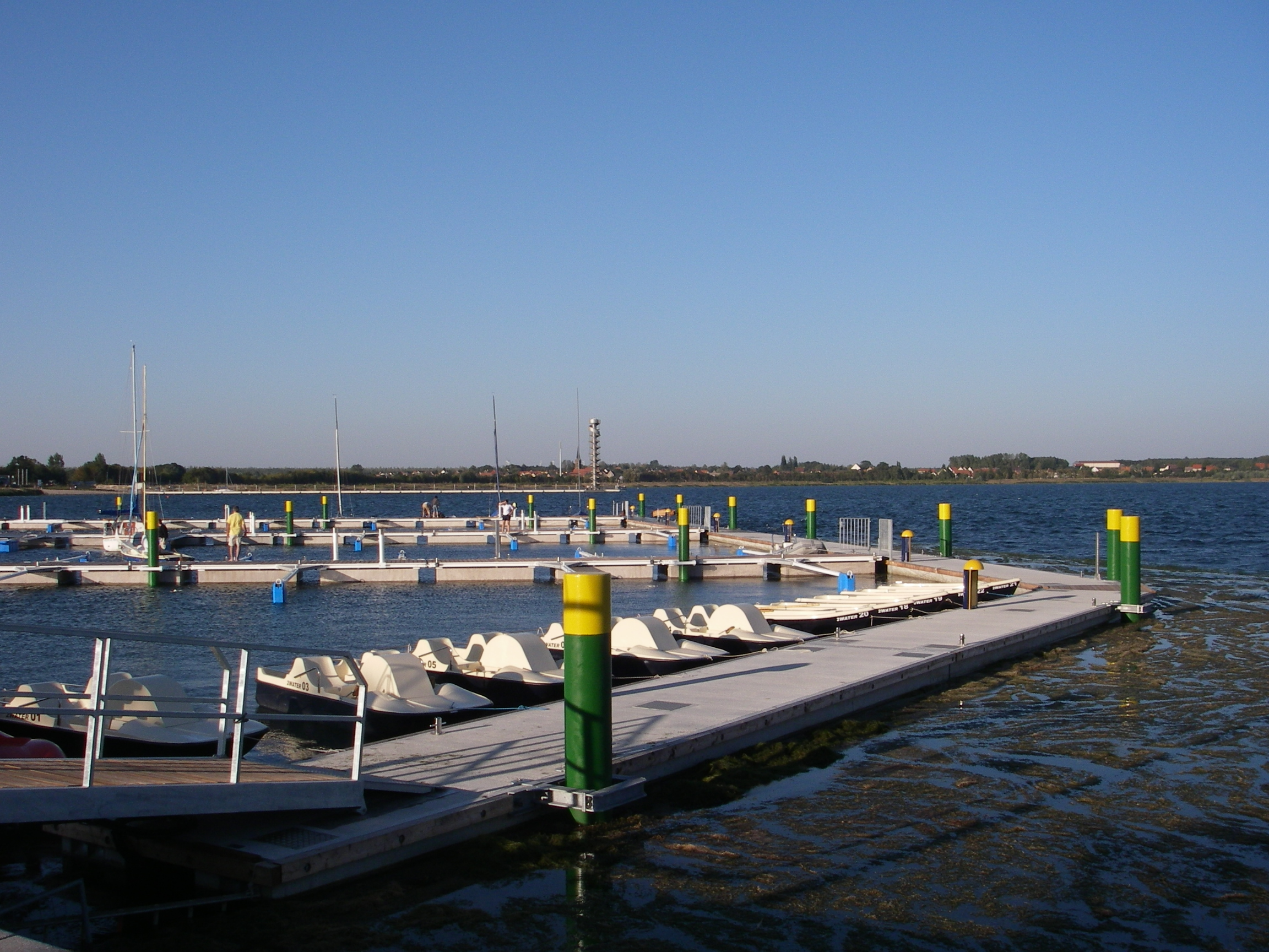 Marina an der Goitzsche